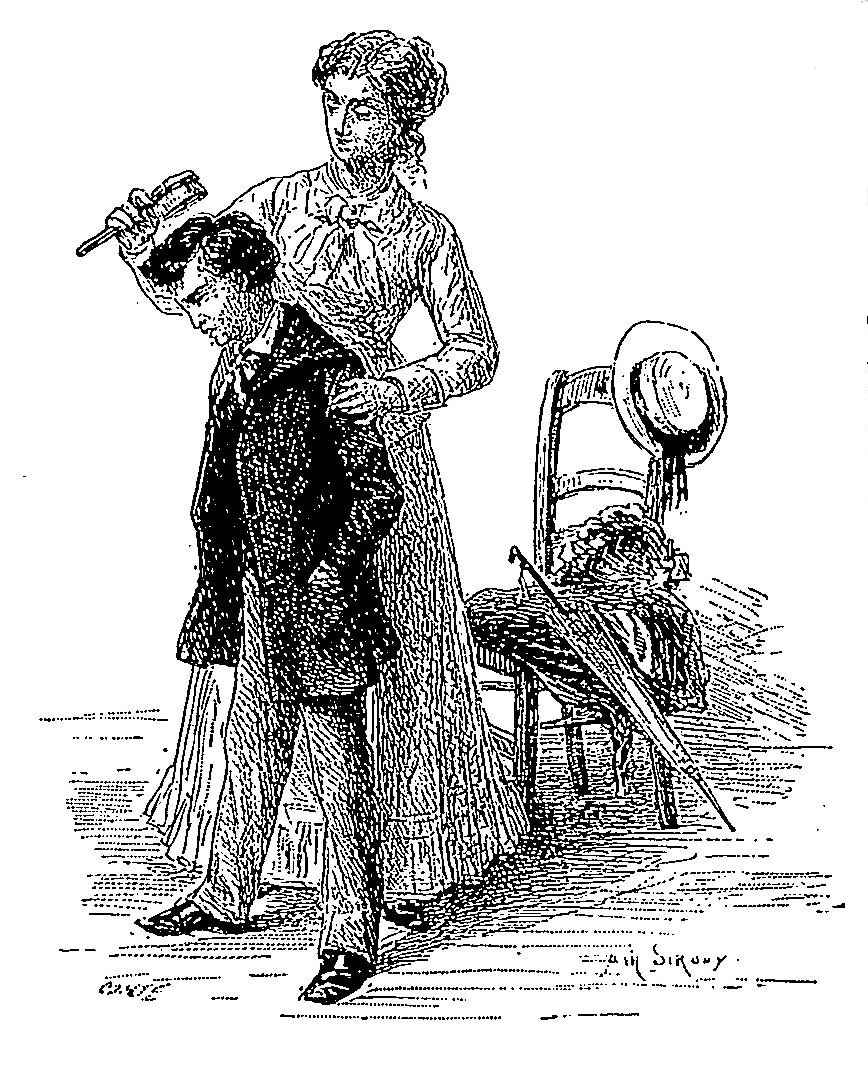 illustration du livre en djvu sur commons